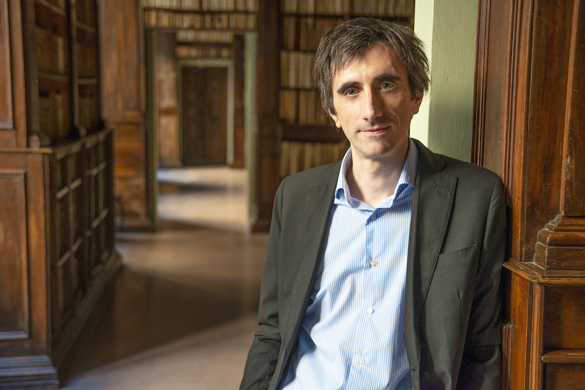 Marco Pivato